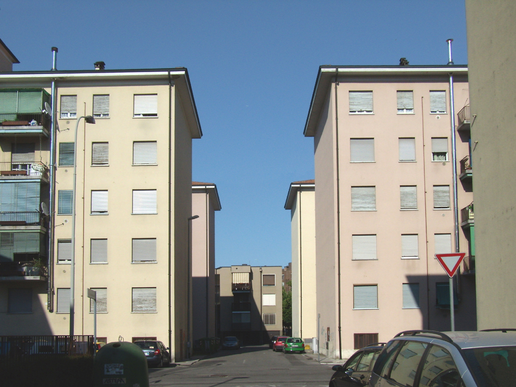 Il quartiere "Apollonio Oliva" a Lodi